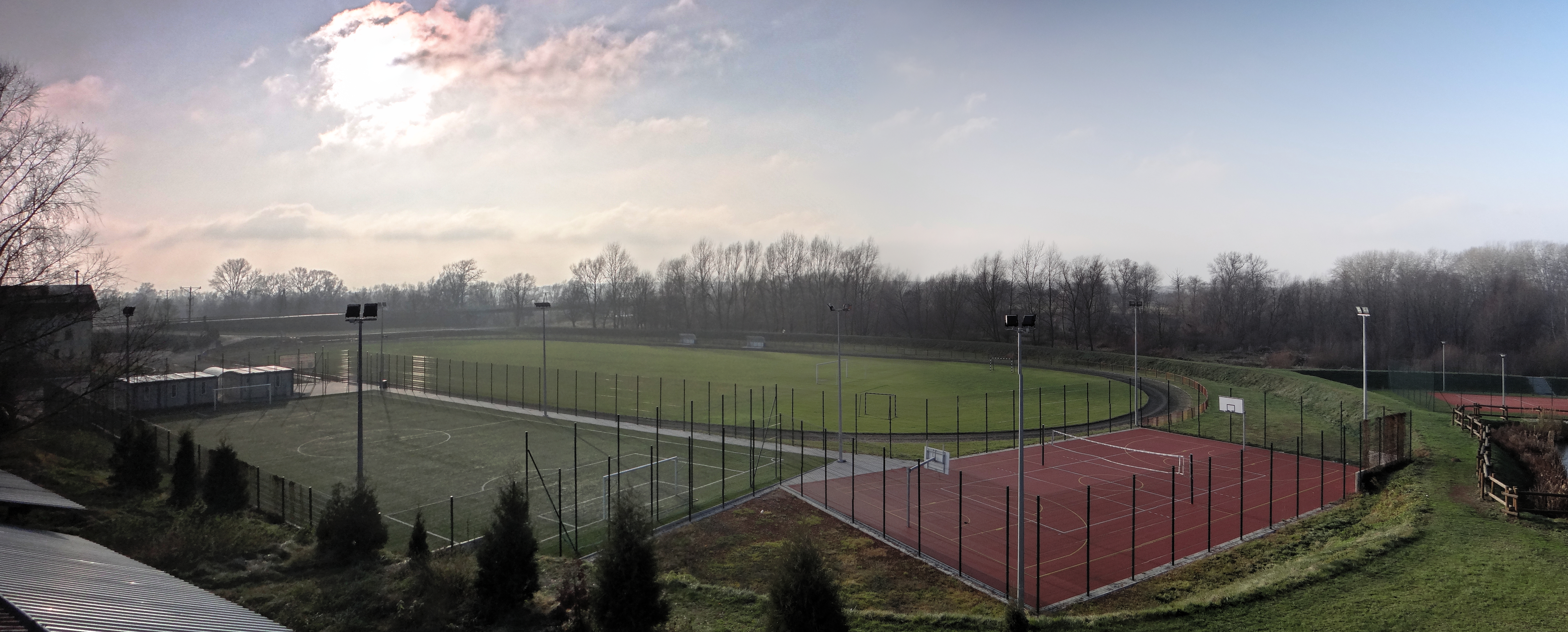 Krzeszów - KS Rotunda - panorama